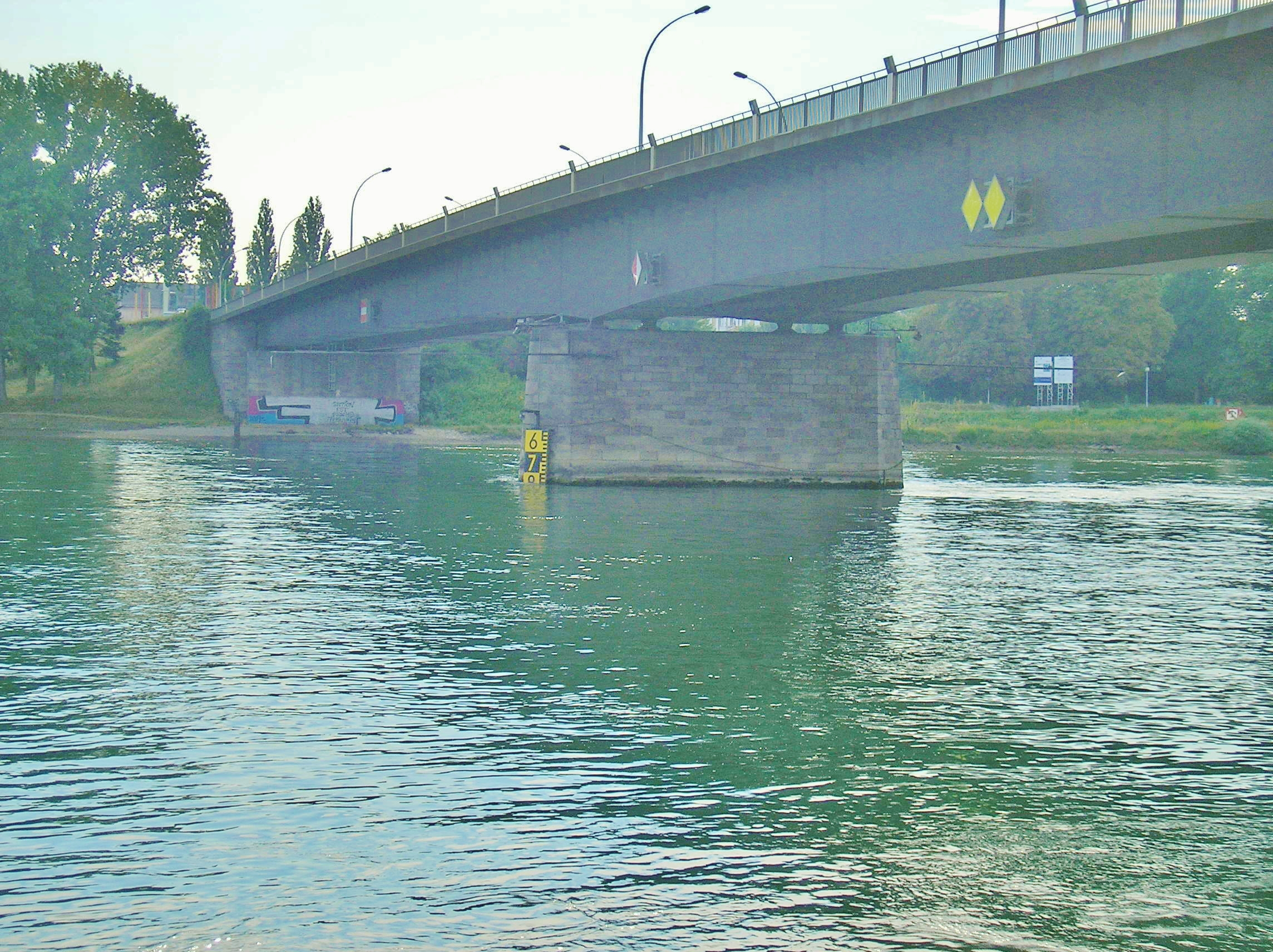 Europabrücke bei Kehl Ansicht von unten